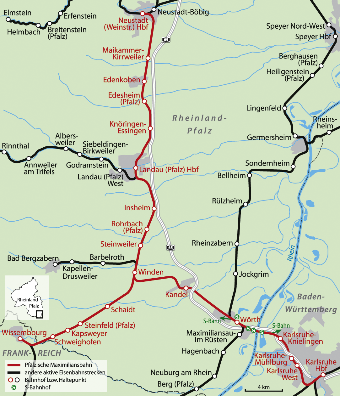 Karte der Pfälzischen Maximiliansbahn